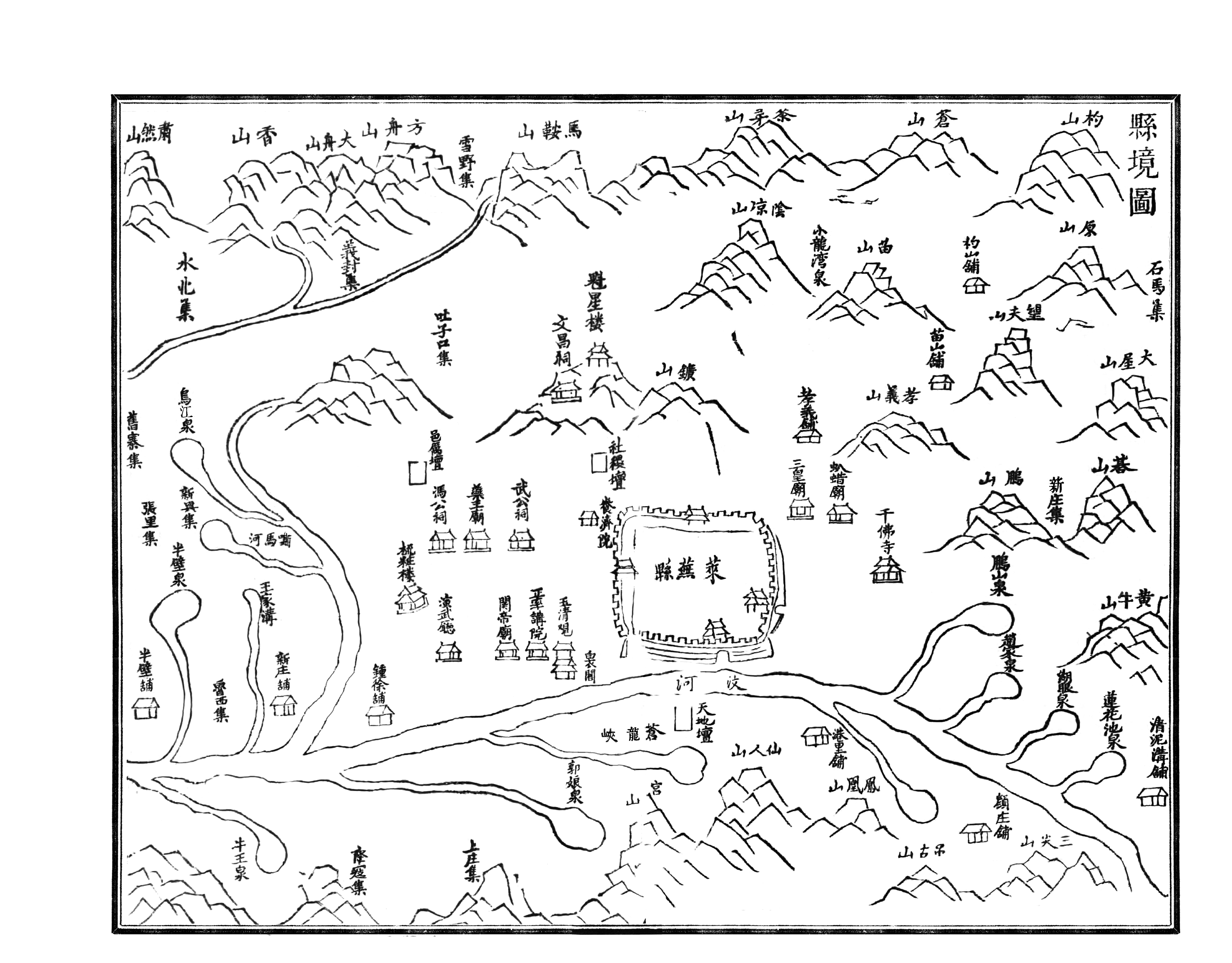 清代康熙年间莱芜县全境图